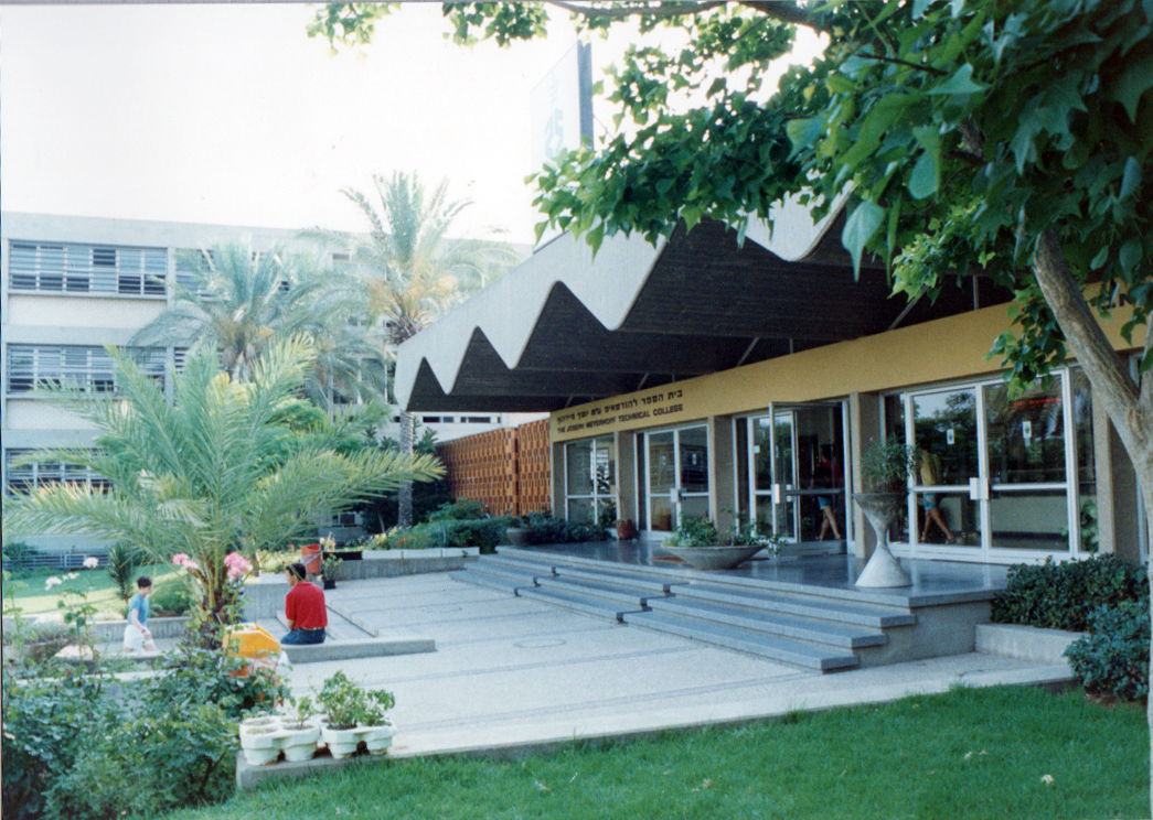 ביה"ס להנדסאים בתל אביב